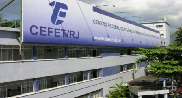 Entrada